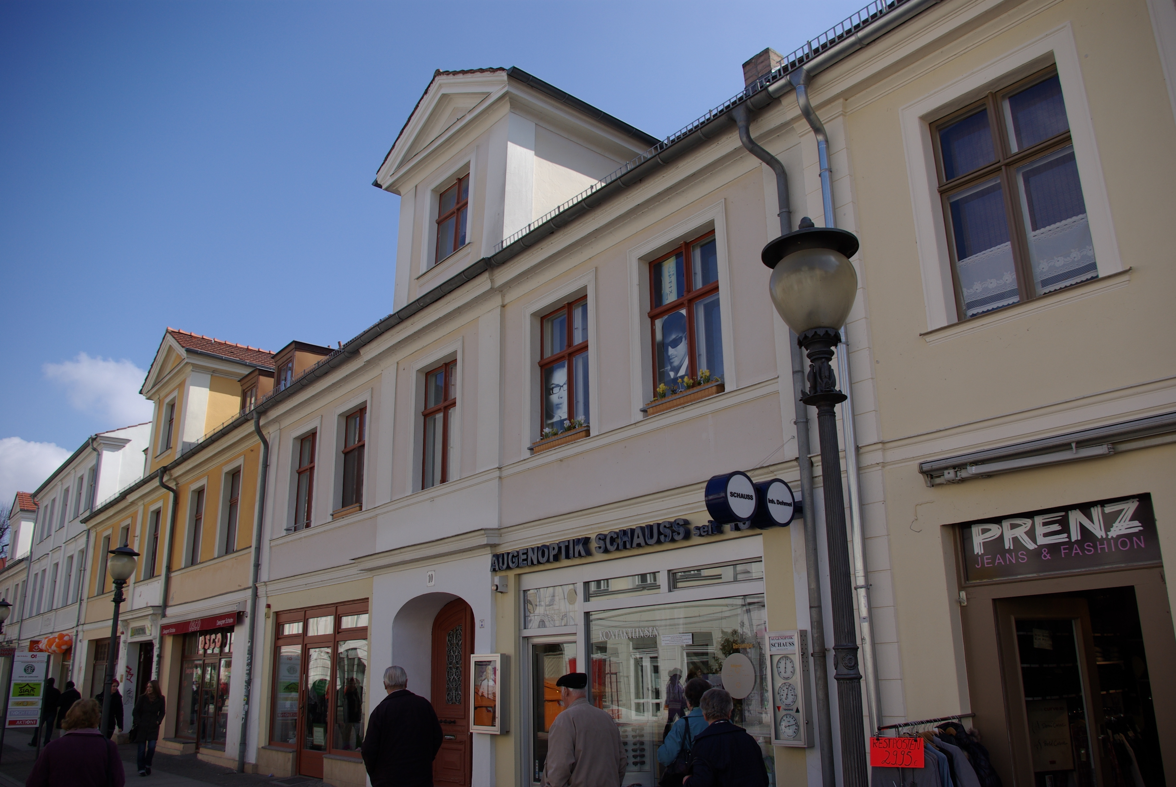 Potsdam in Brandenurg. Das Haus in der Brandenburger Straße 10 steht unter Denkmalschutz.